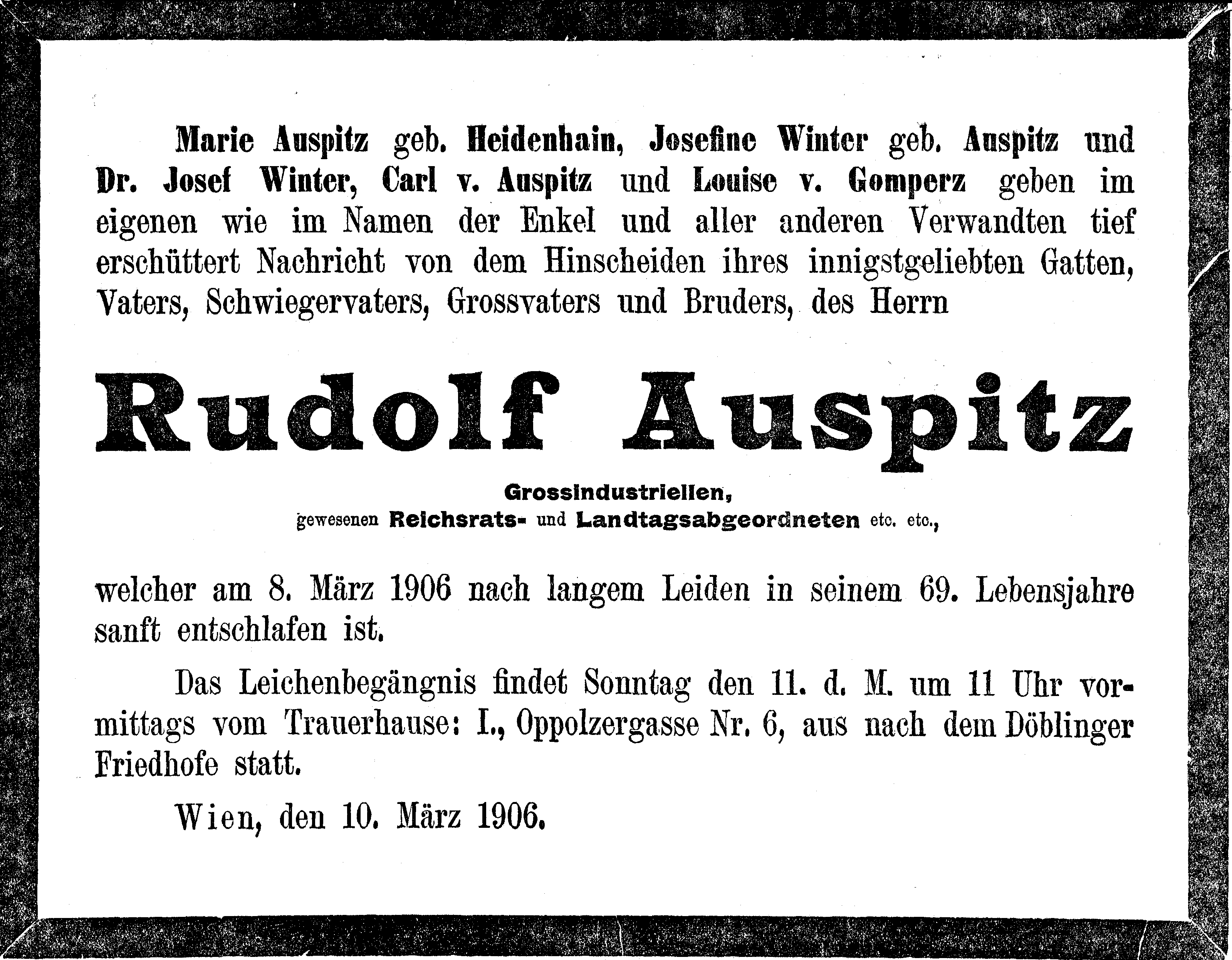 Todesanzeige des Rudolf Auspitz